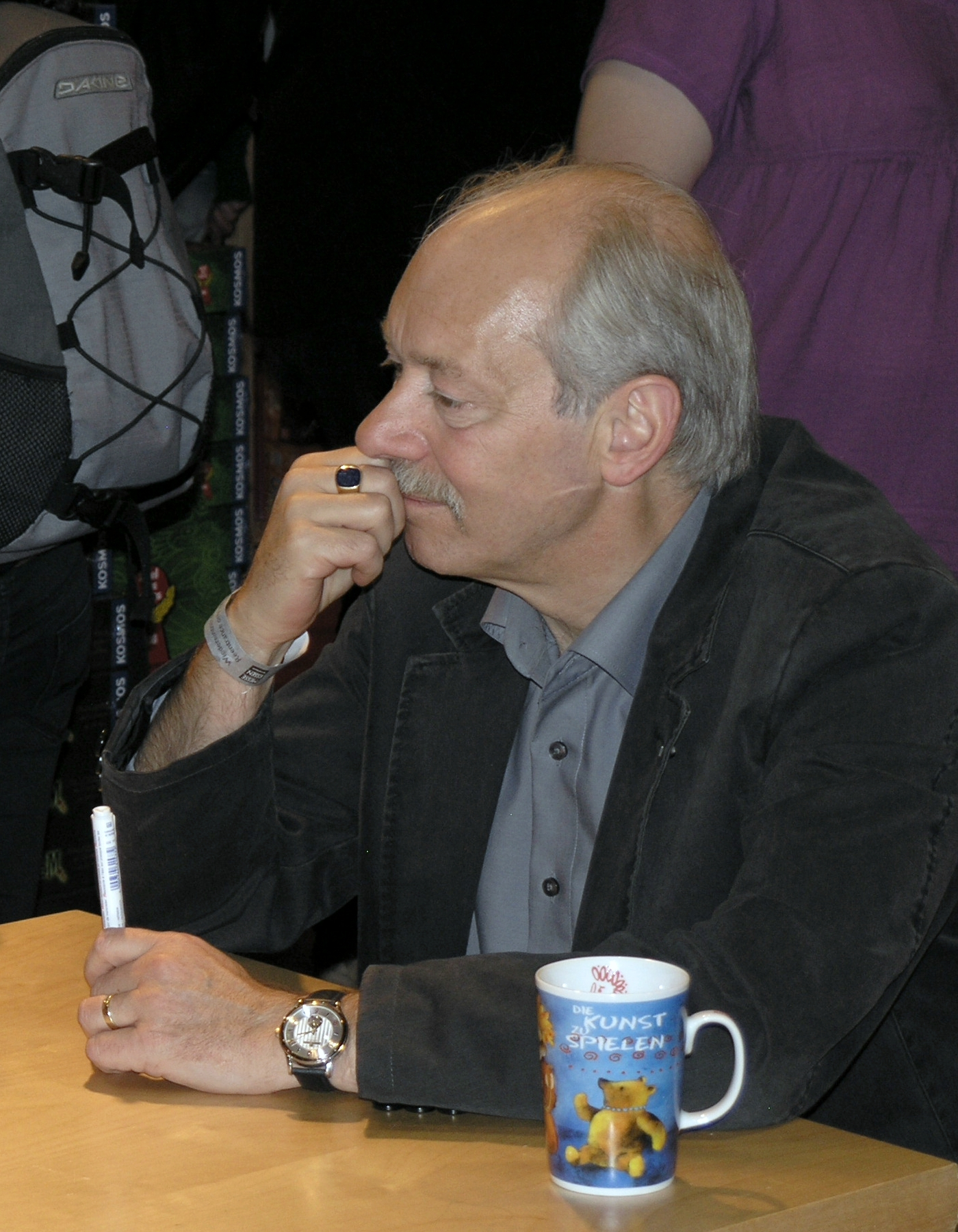 Internationalen Spieltage SPIEL 2008